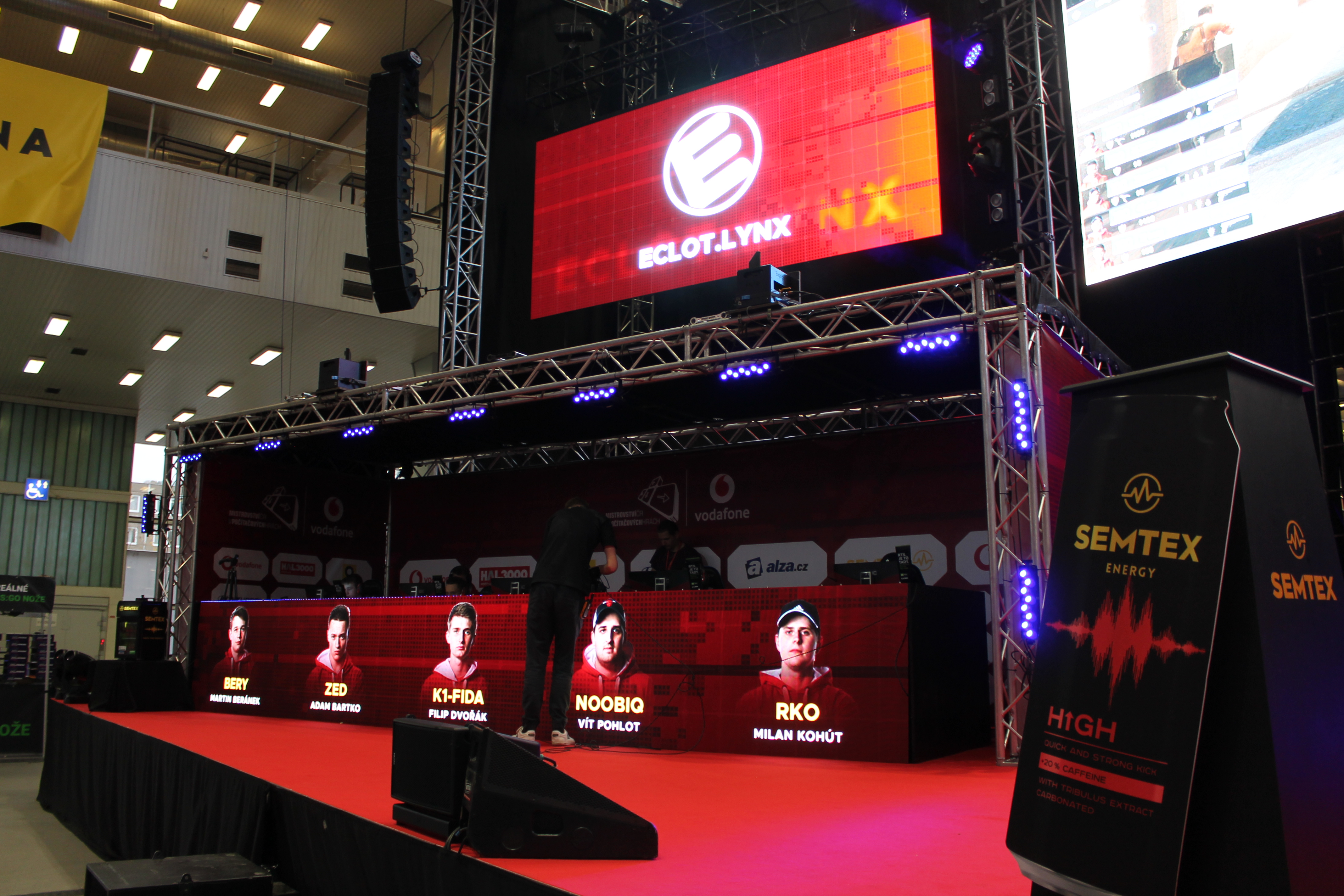 eclot